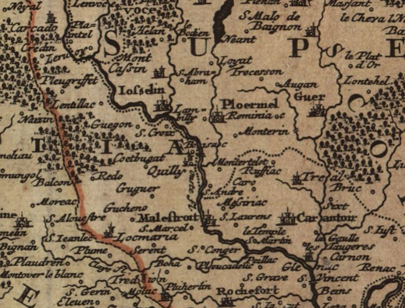 Extrait de la Tabula ducatus britanniae gallis. Le gouvernement général de Bretagne in suos novem episcopatus omnes Turonensi Aurel. Extrait centré autour de Josselin et Ploermel.